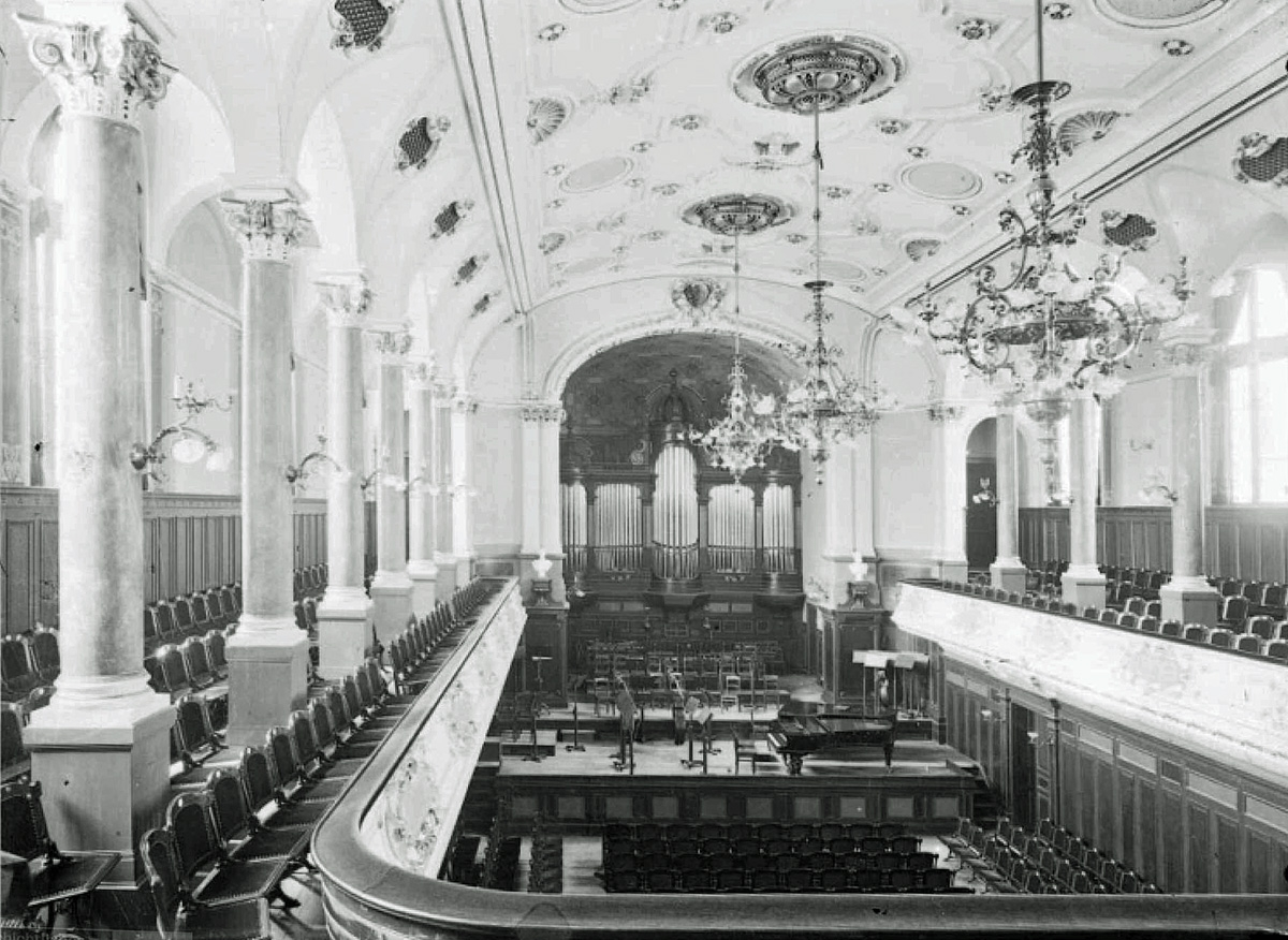 Vortragssaal des Konservatoriums für Musik in Leipzig, Grassistraße 8, Aufnahme um 1900